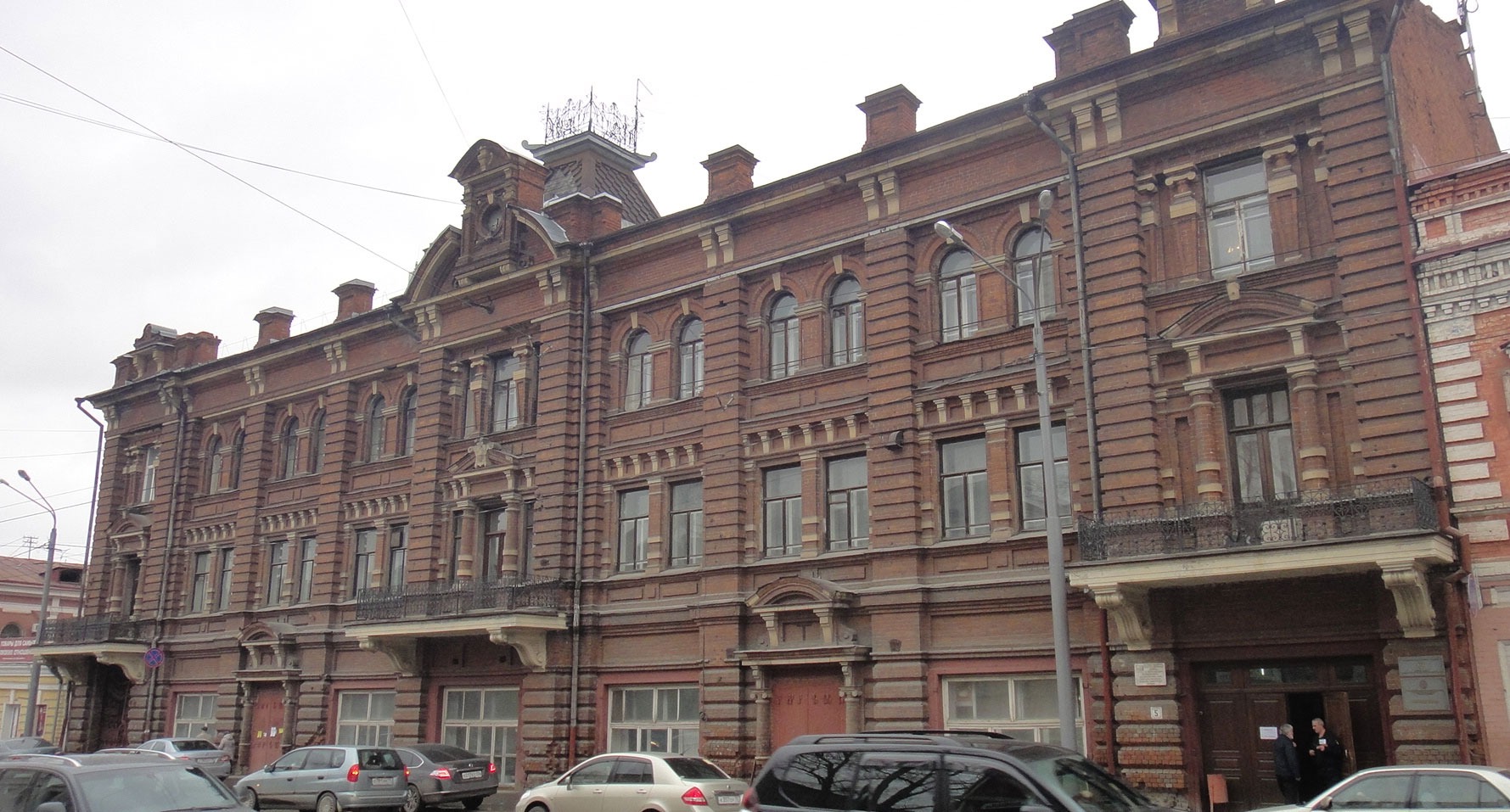 Доходный дом Смирнова в Томске